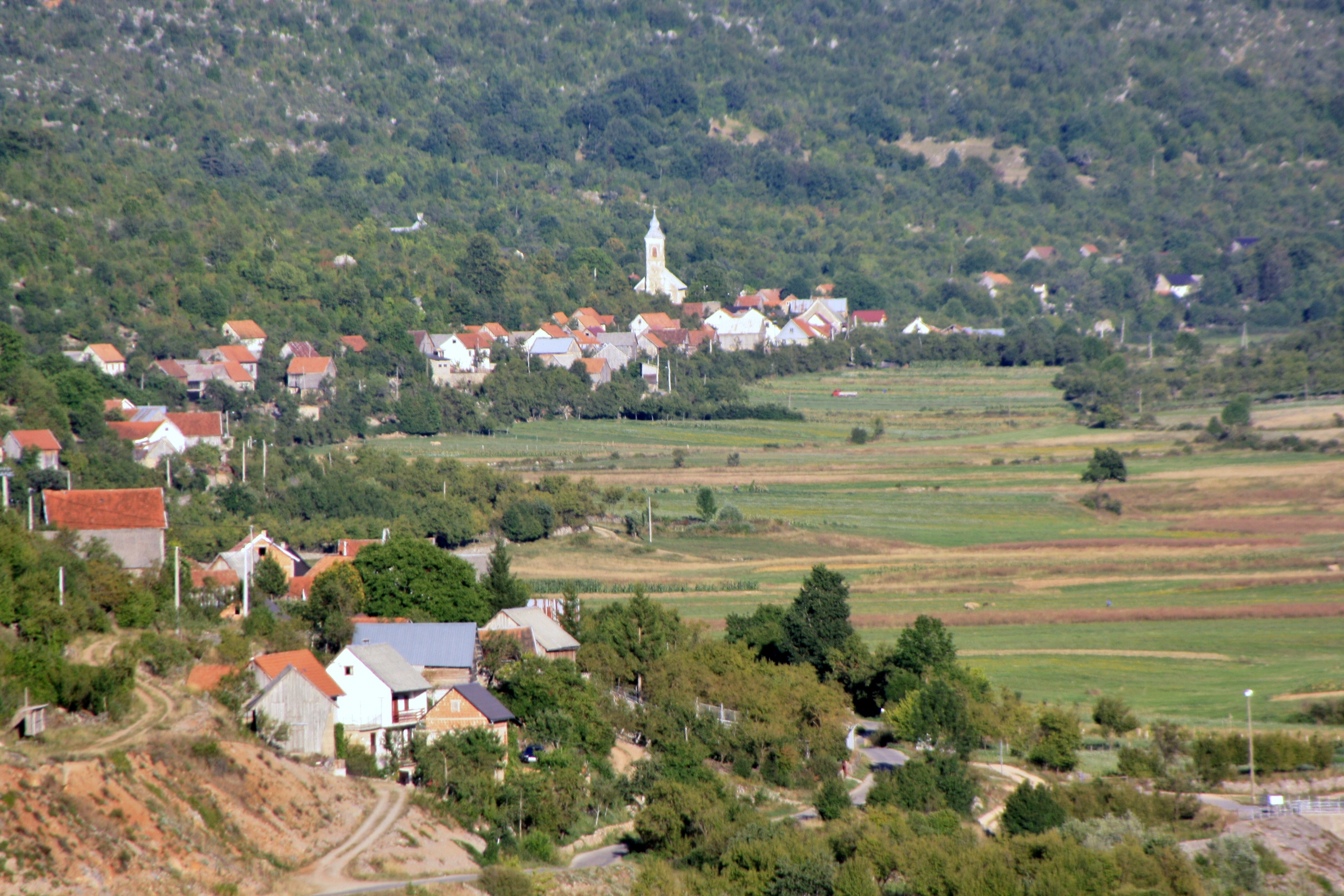 D.Kosinj